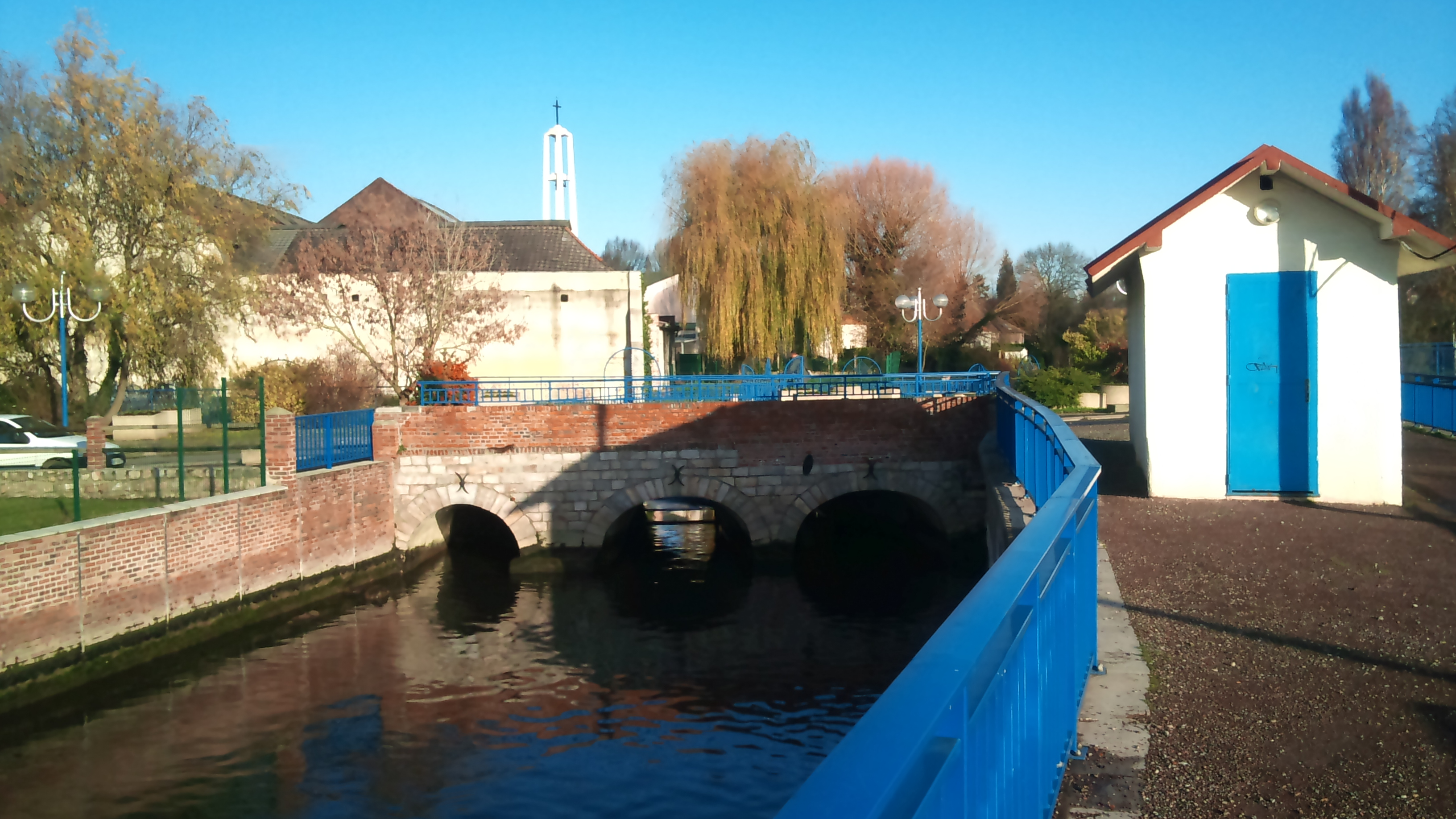 Lambres-lez-Douai - Quai Danton